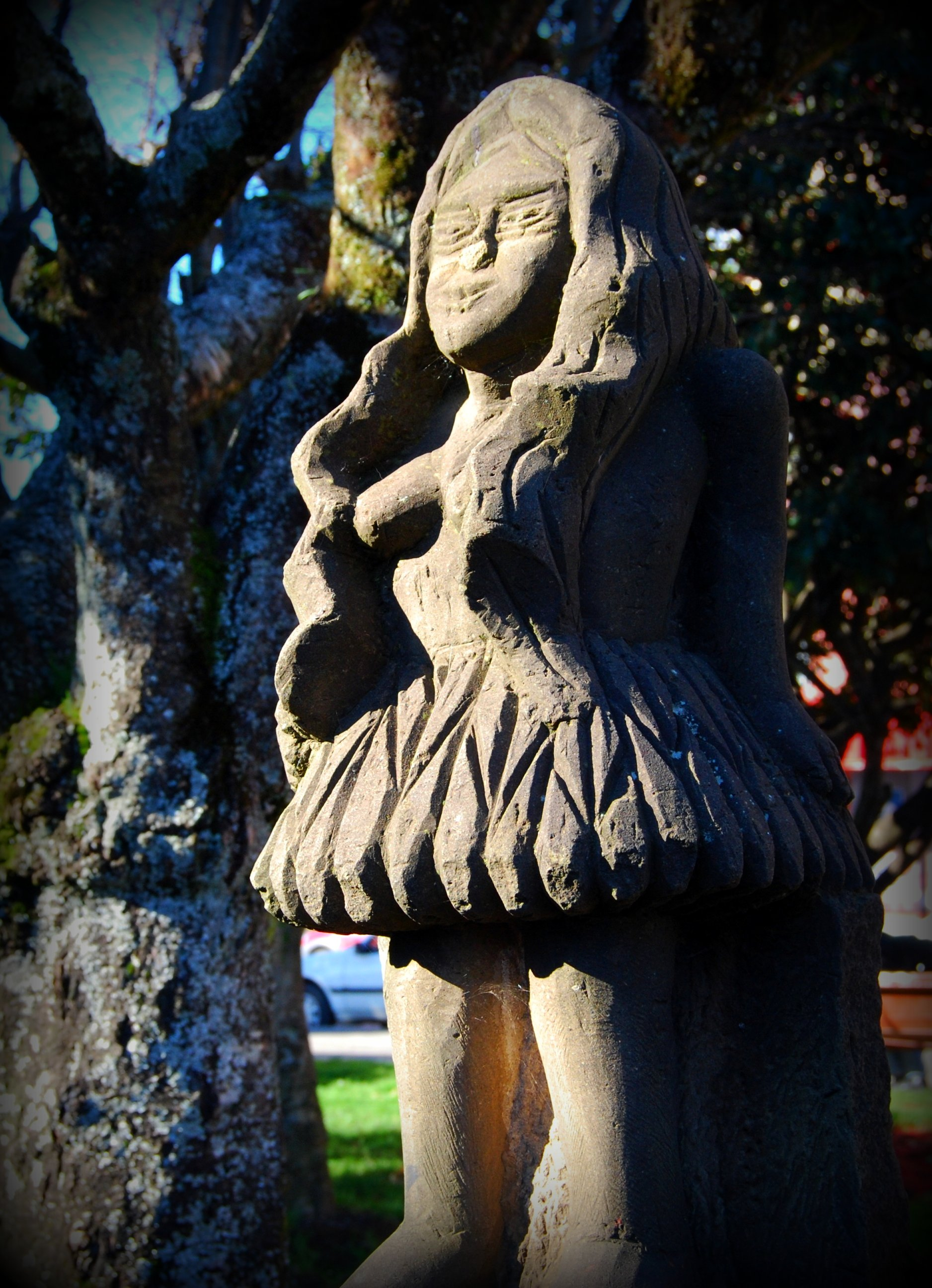 Estatua de la Pincoya, en la plaza de Armas de Ancud.